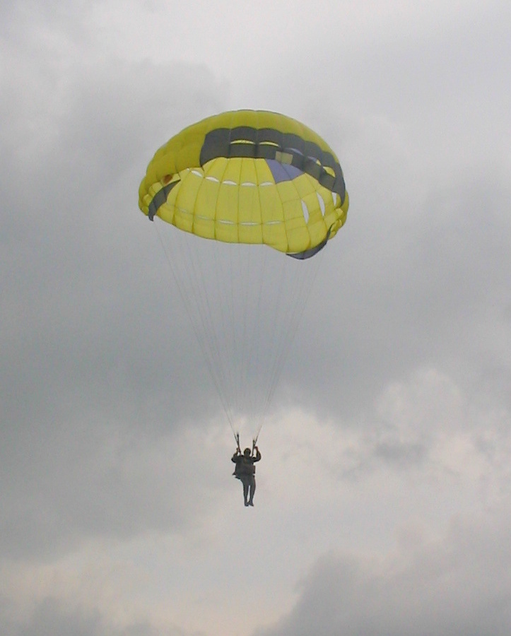 Uczeń-skoczek Krzysztof Moj ze spadochronem typu: „ST-7“ na podejściu do lądowania – Sekcja Spadochronowa Aeroklubu Śląskiego